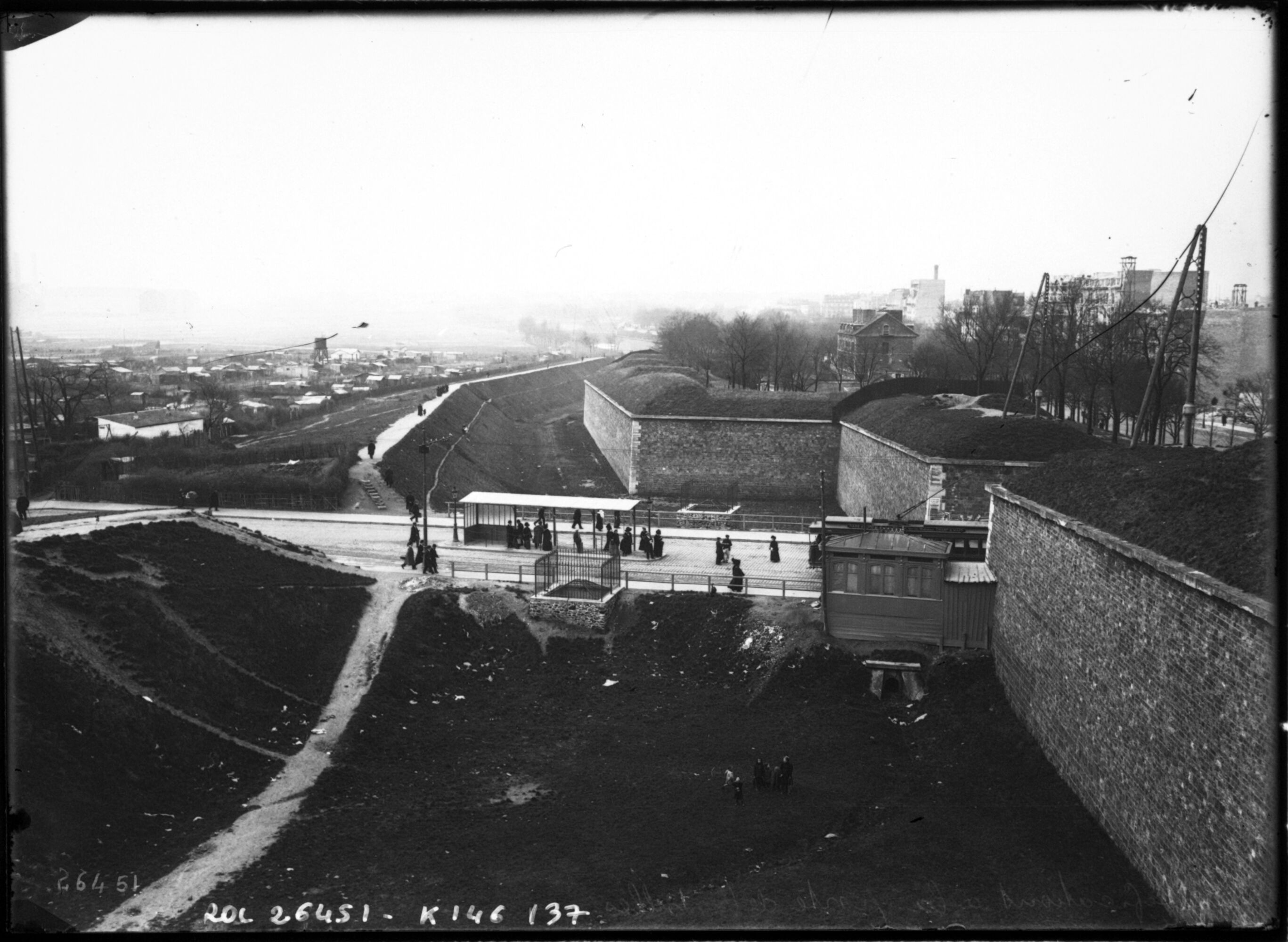 Fortifications de la porte de Versailles (Paris)